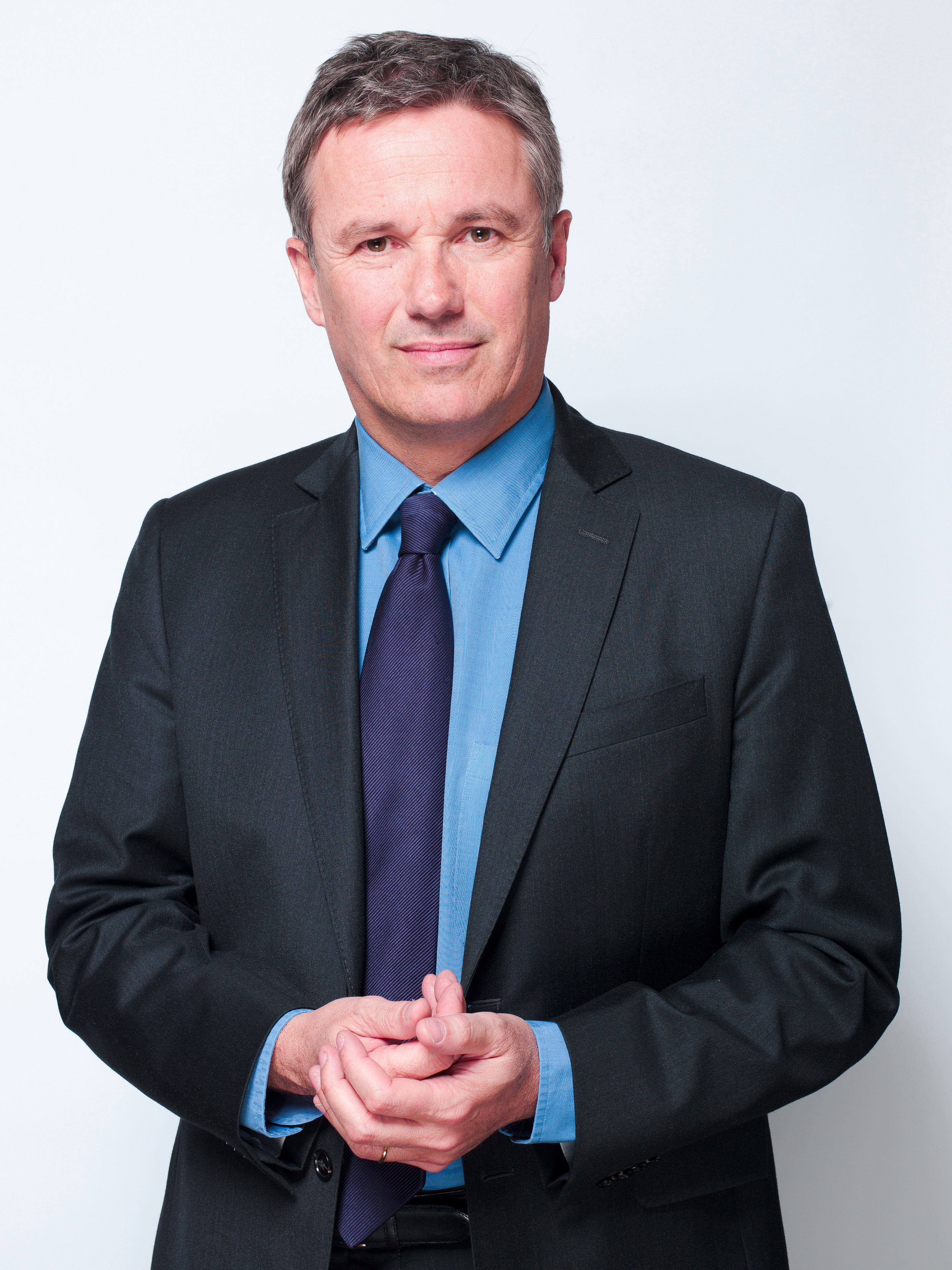 Portrait 8